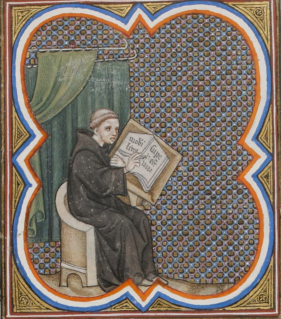 Primat composant son ouvrage (Roman des rois). Grandes Chroniques de France, Paris, BnF, département des Manuscrits, Français 2813, fol. 265v.